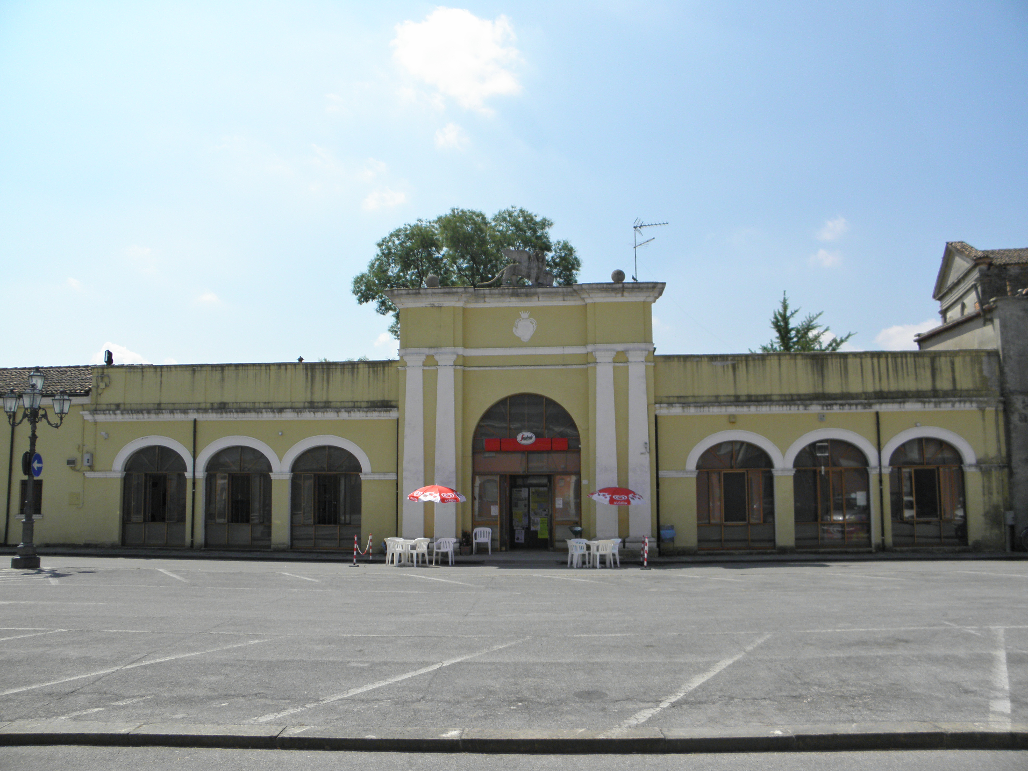 Gavello: Palazzo Gradenigo Mocenigo.